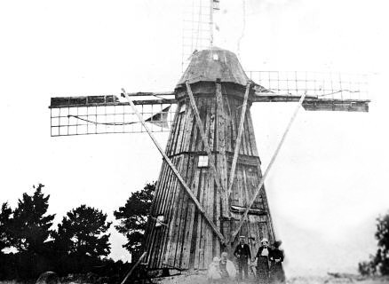 Överby kvarn fån söder. I mitten står mjölnaren Abraham Karlsson som arrenderade kvarnen 1896-1909.